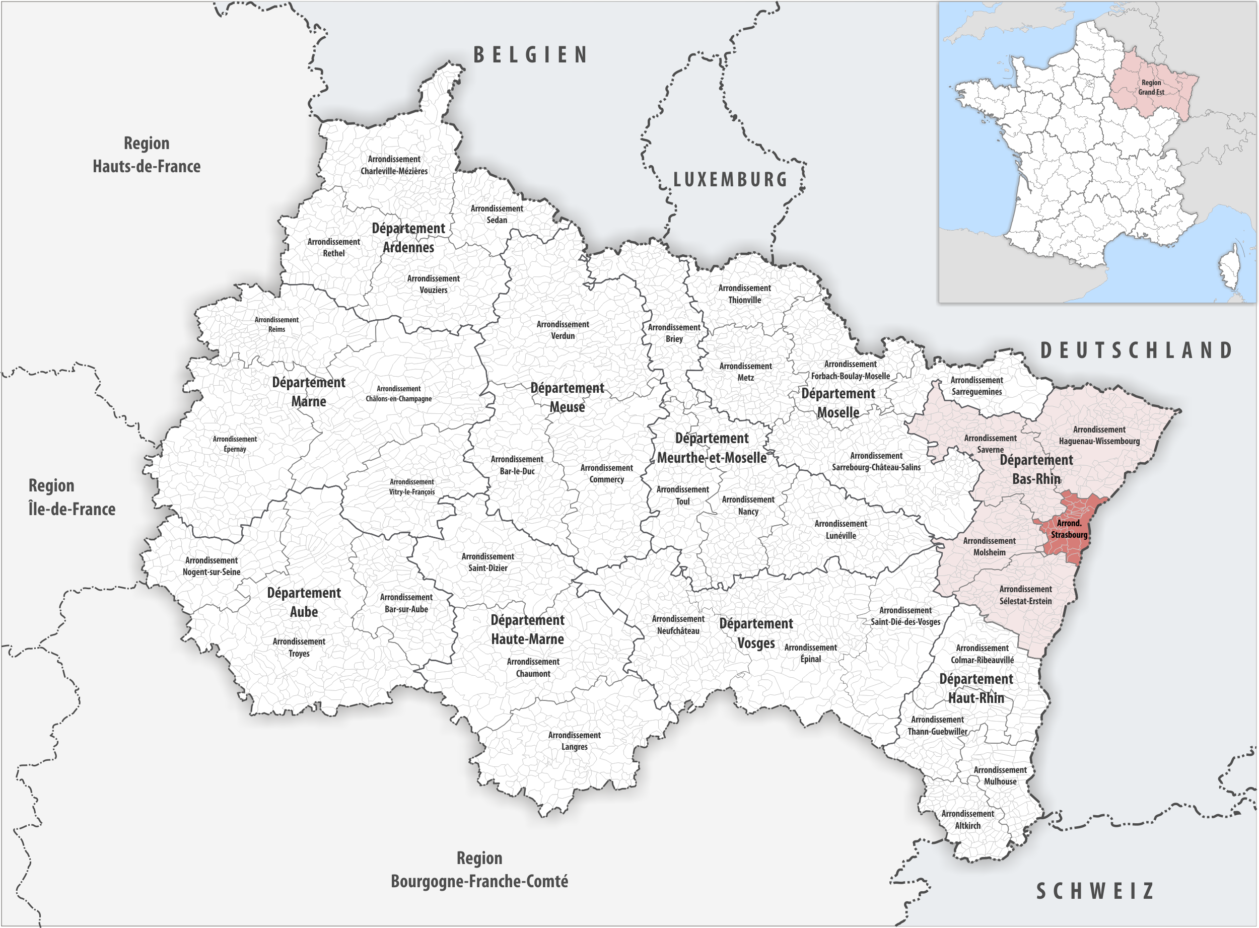 Lage des Arrondissements Strasbourg